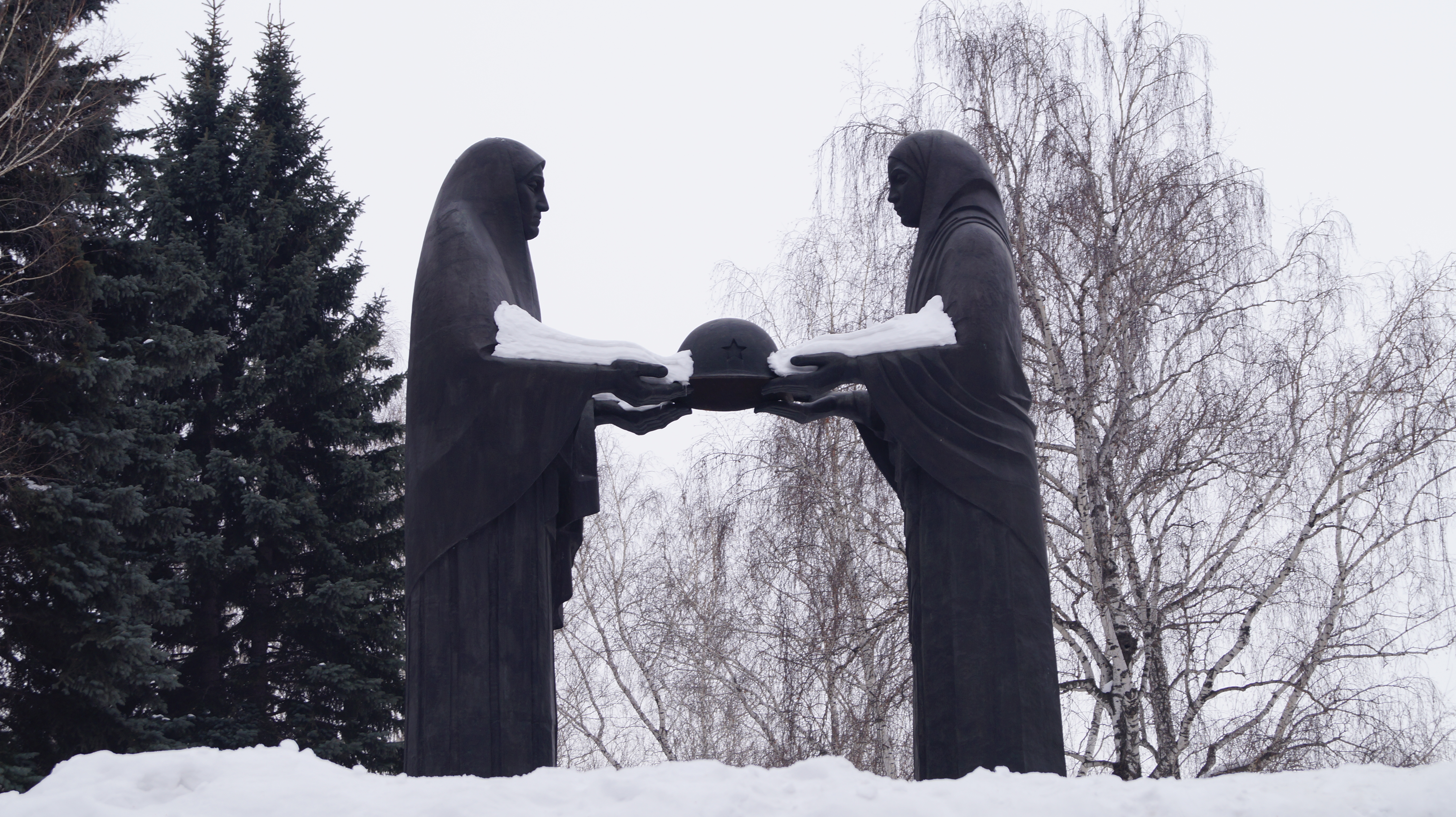 Скорбящие Матери. Лесное кладбище. Челябинск. 1975 год. Скульпторы: Л. Н. Головницкий, Э. Э. Головницкая, Архитекторы: Ю. П. Данилов, И. В. Талалай.